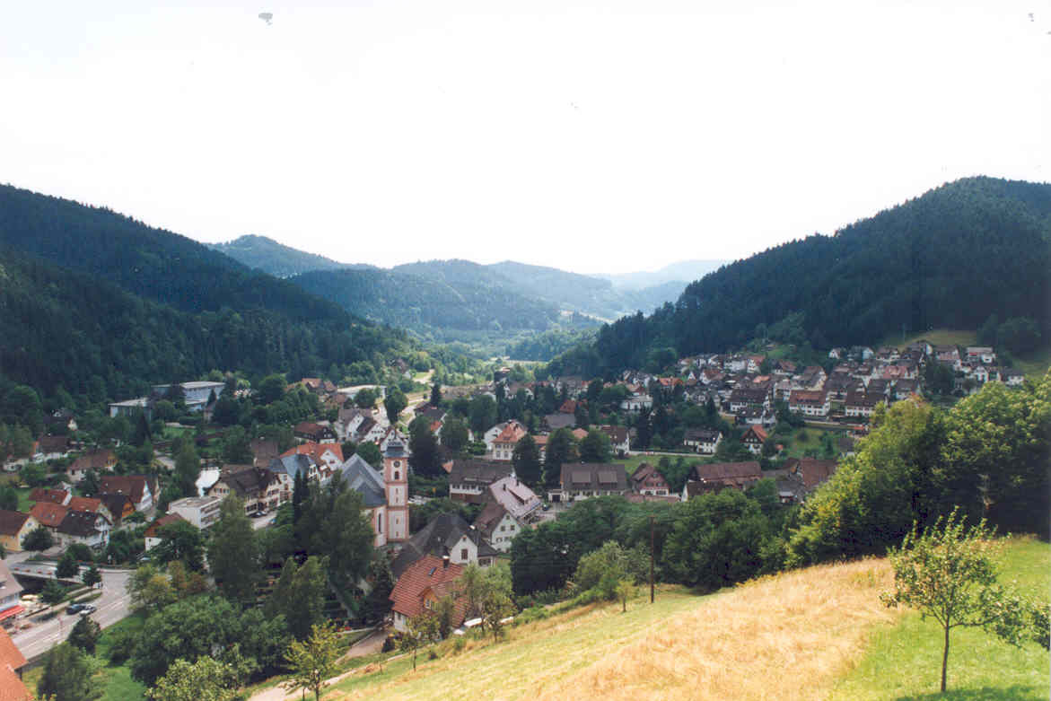 Schenkenzell, Ortslage